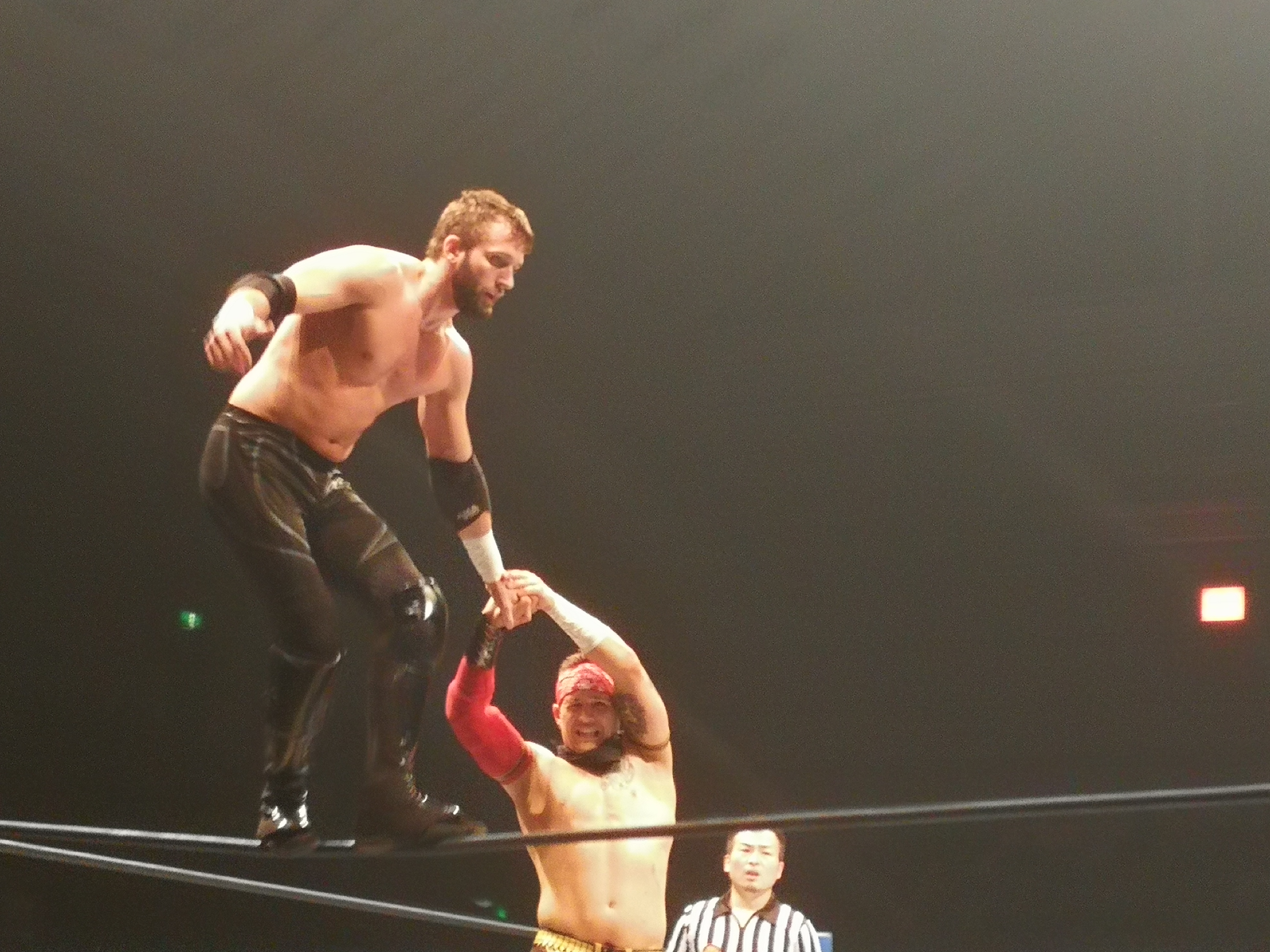 エル・ファンタズモのロープウォーク・ラ・ケブラーダをかけられるロビー・イーグルス（2019年11月3日）